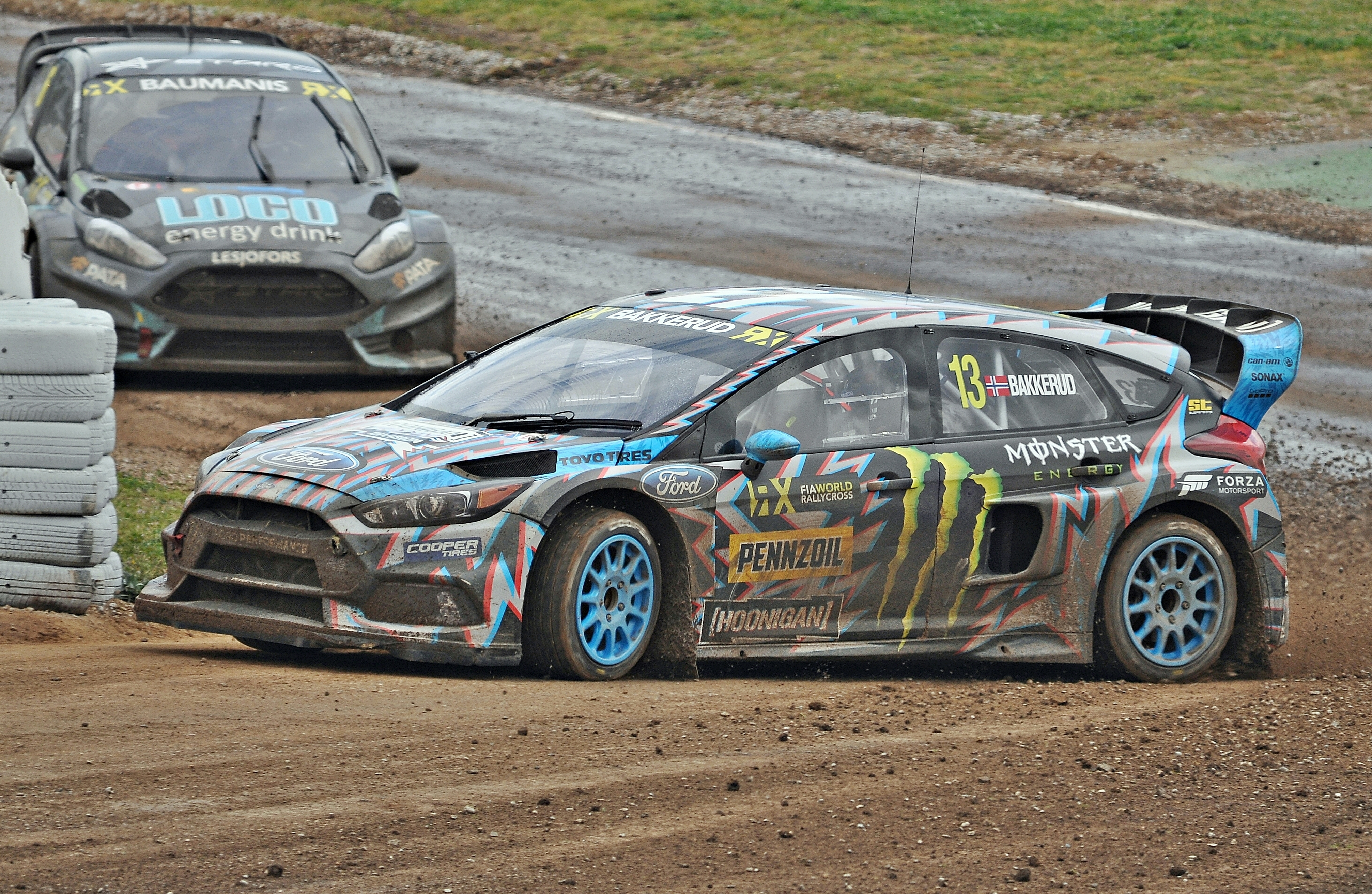 RX Barcelona